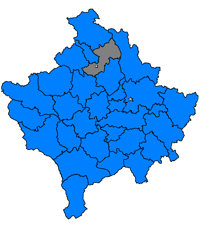 Mitrovicë, Kosovë 2006